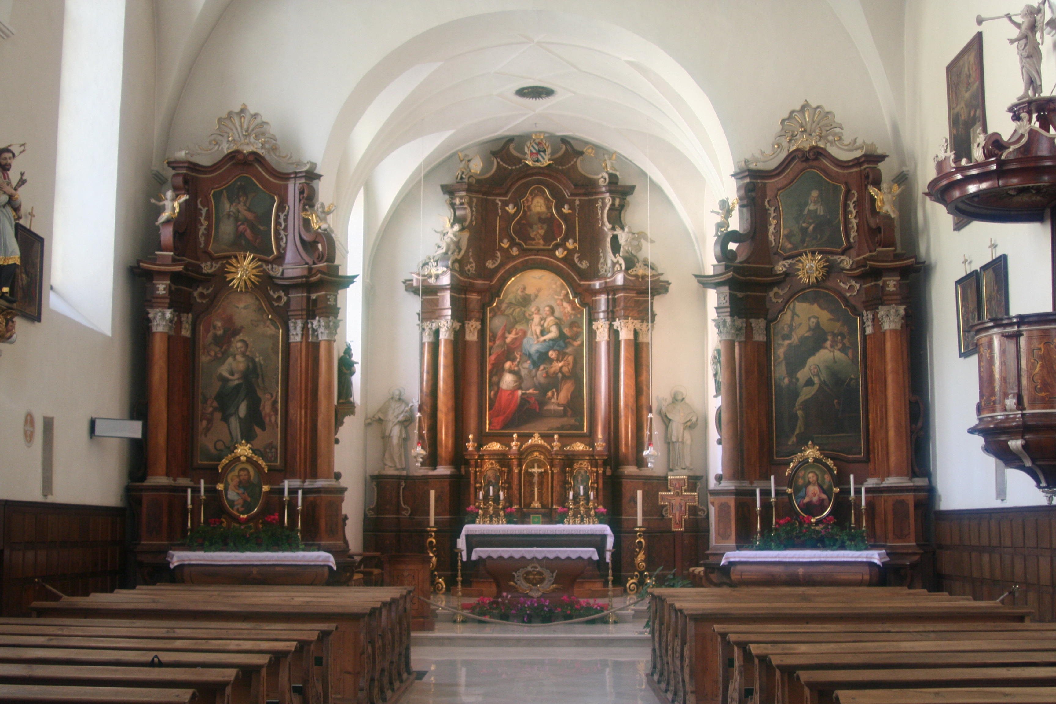 Franziskanerkloster Innichen, Innenansicht